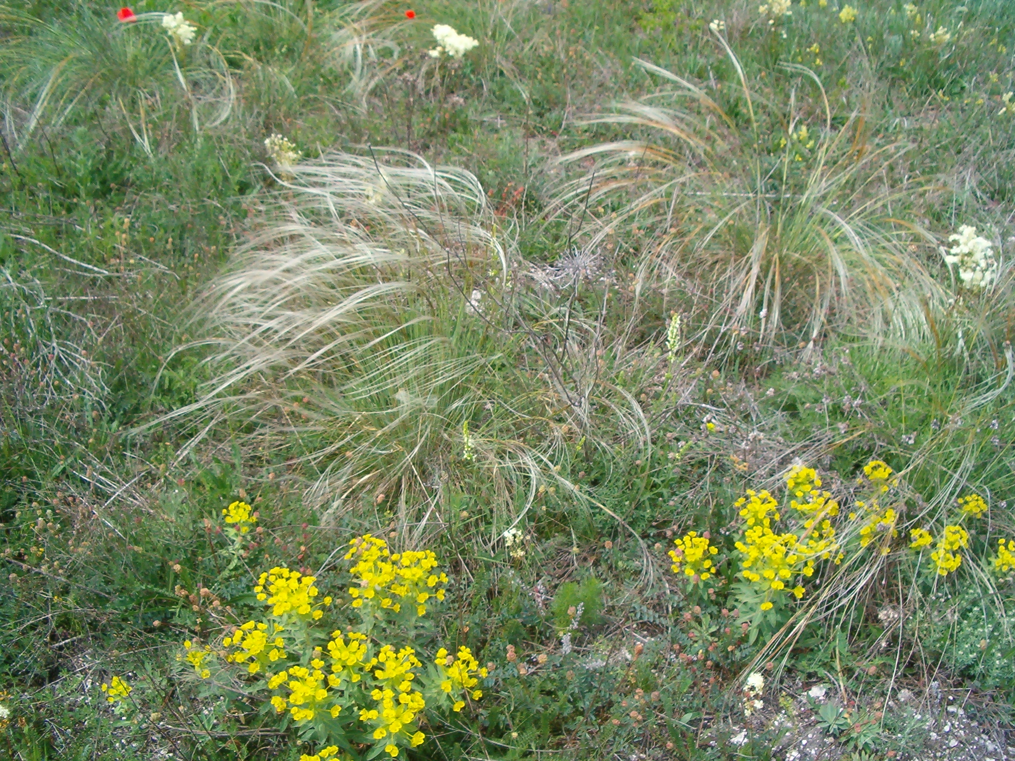 Árvalányhaj (Stipa sp.)